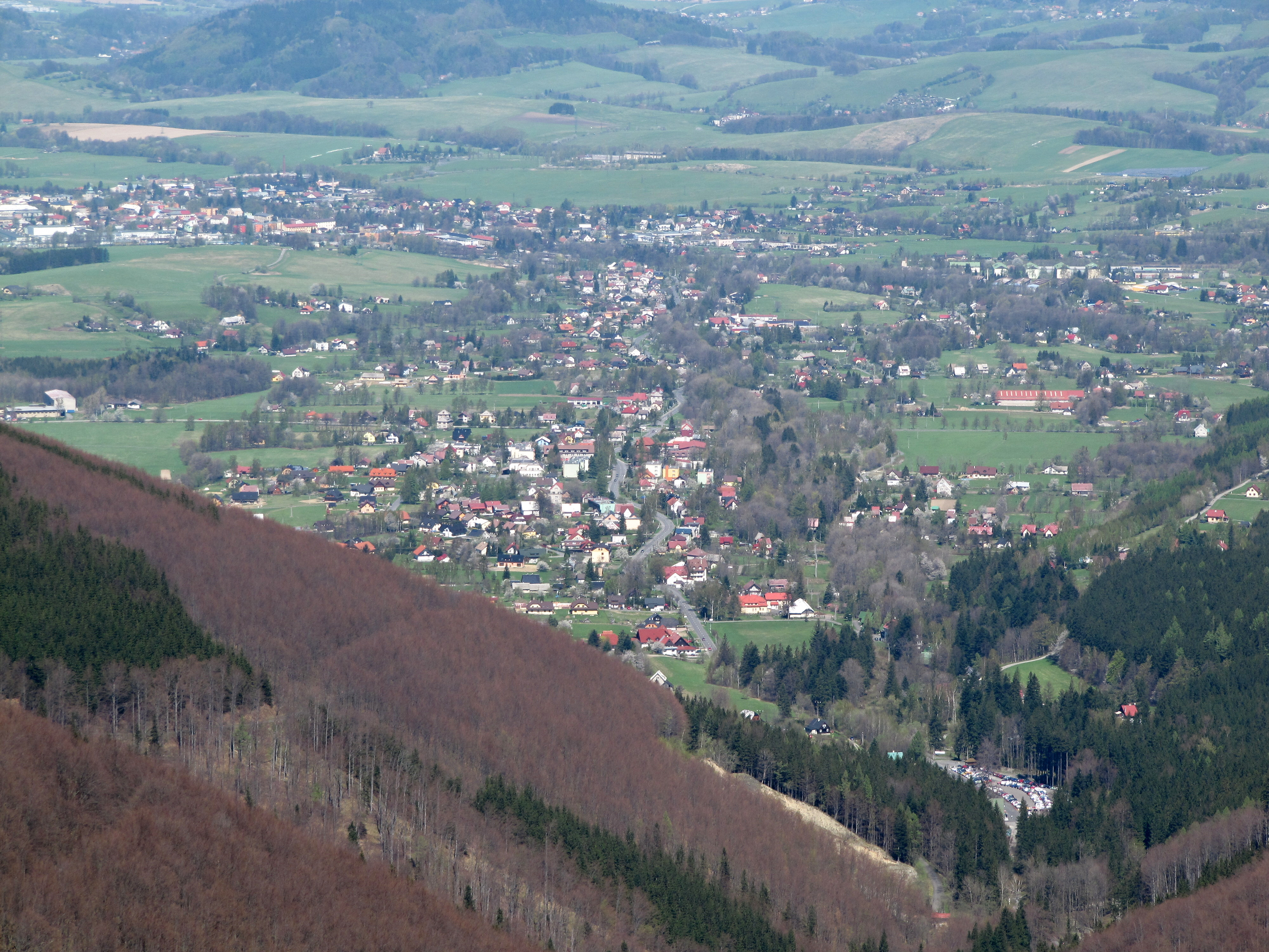 Trojanovice